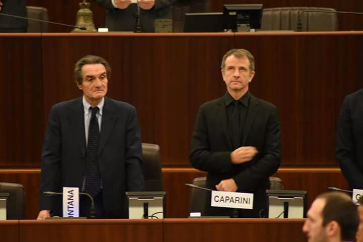 il Presidente di Regione Lombardia Attilio Fontana e L'Assessore al Bilancio Davide Caparini nel corso del primo consiglio regionale della XI° Legislatura